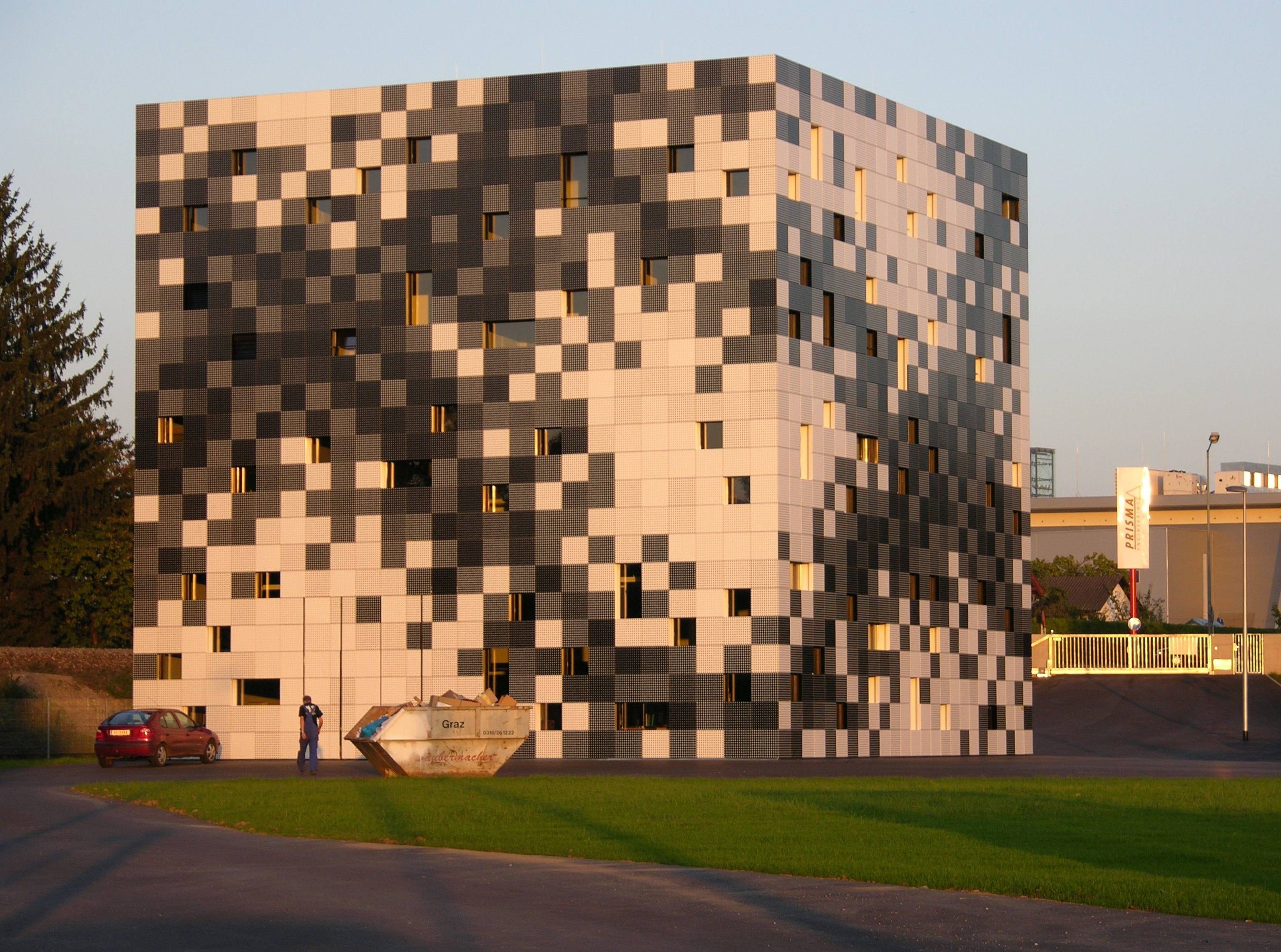 "Frog Queen", Architektur: SPLITTERWERK, Graz, 2007